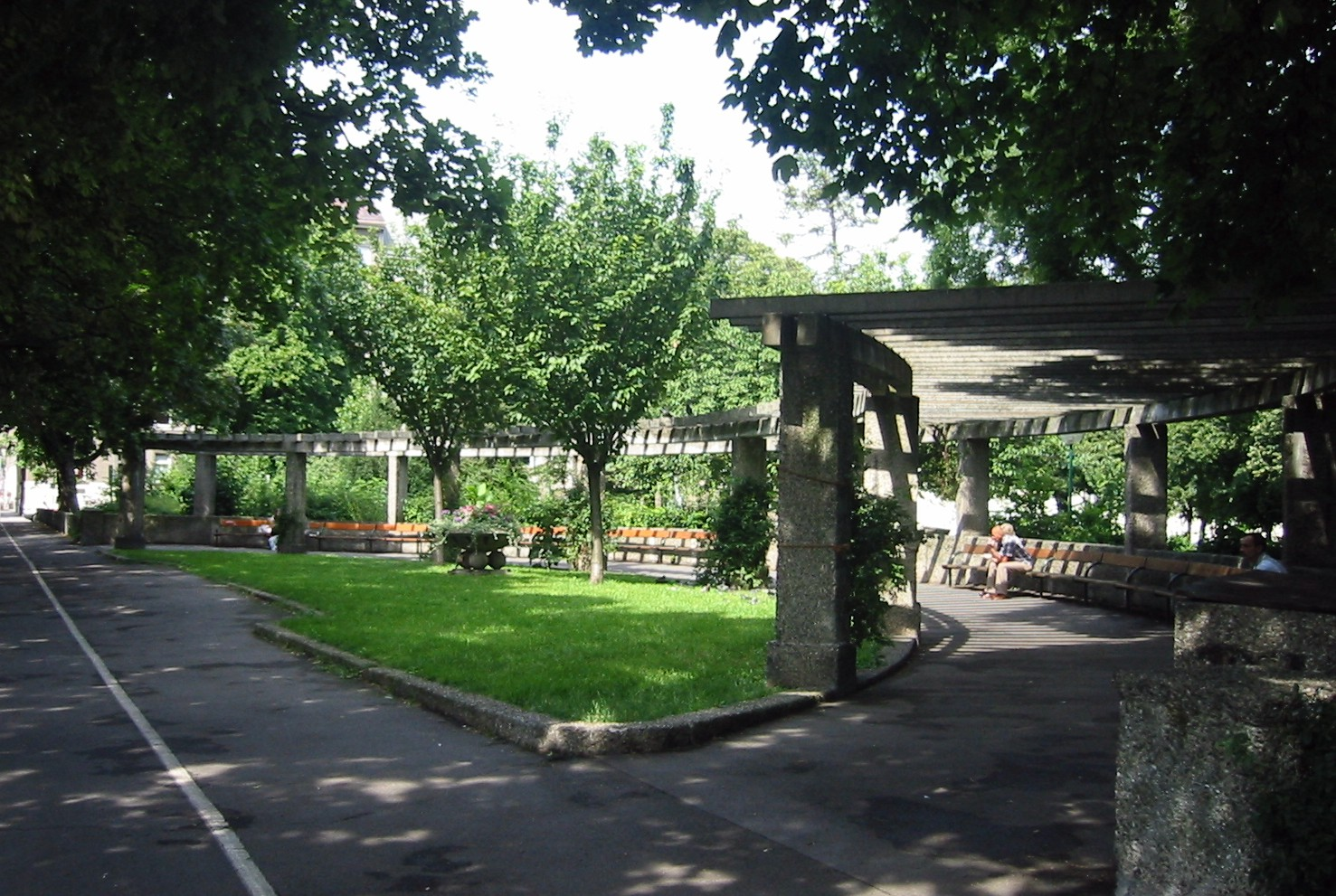 Wien, Haydnpark, Eingang Flurschützstraße mit Pergola